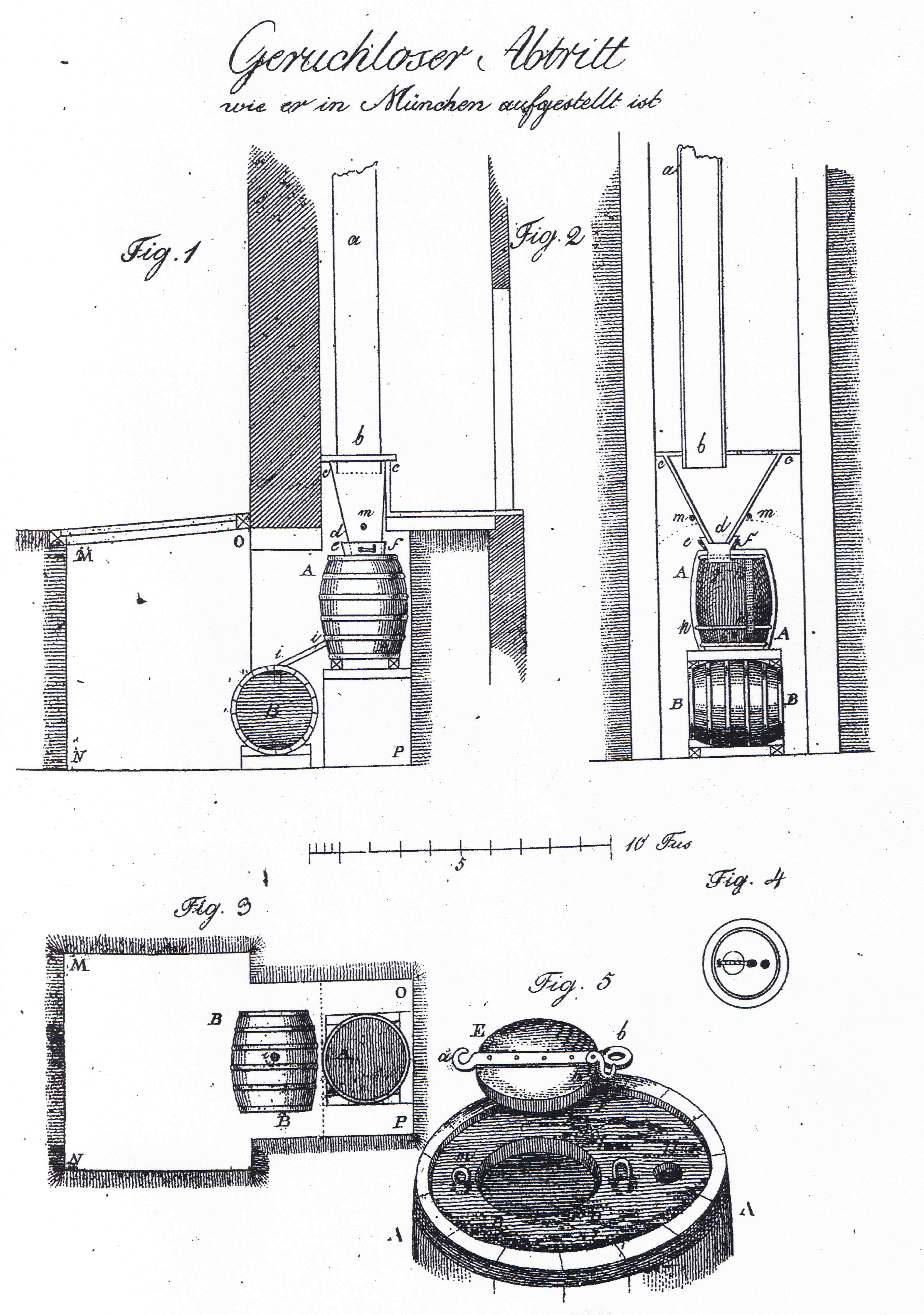 Geruchloser beweglicher Abtritt, technische Innovation im Sanitärwesen 1821 Paris/München